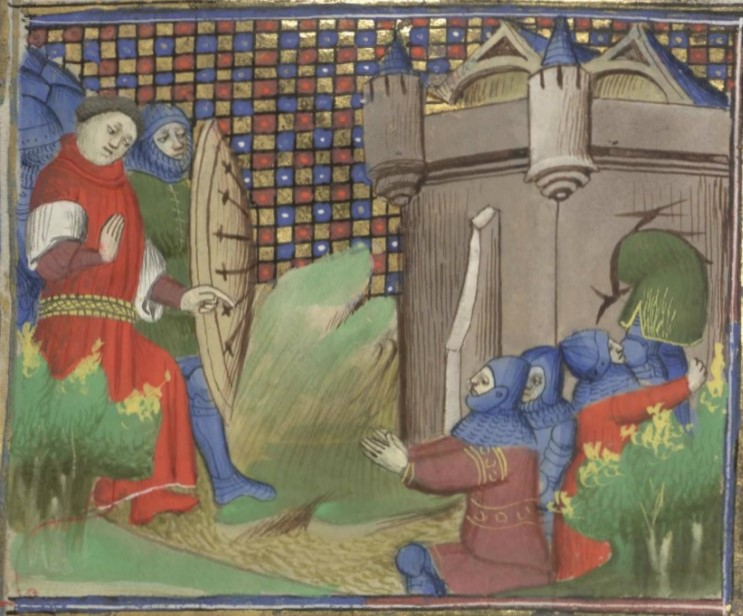 Les hommes de Jean d'Armagnac et du sire d'Albret se rendent à Fébus lors de la bataille de Cazères en 1376. Ils sortent de la ville par un trou réalisé dans les remparts.